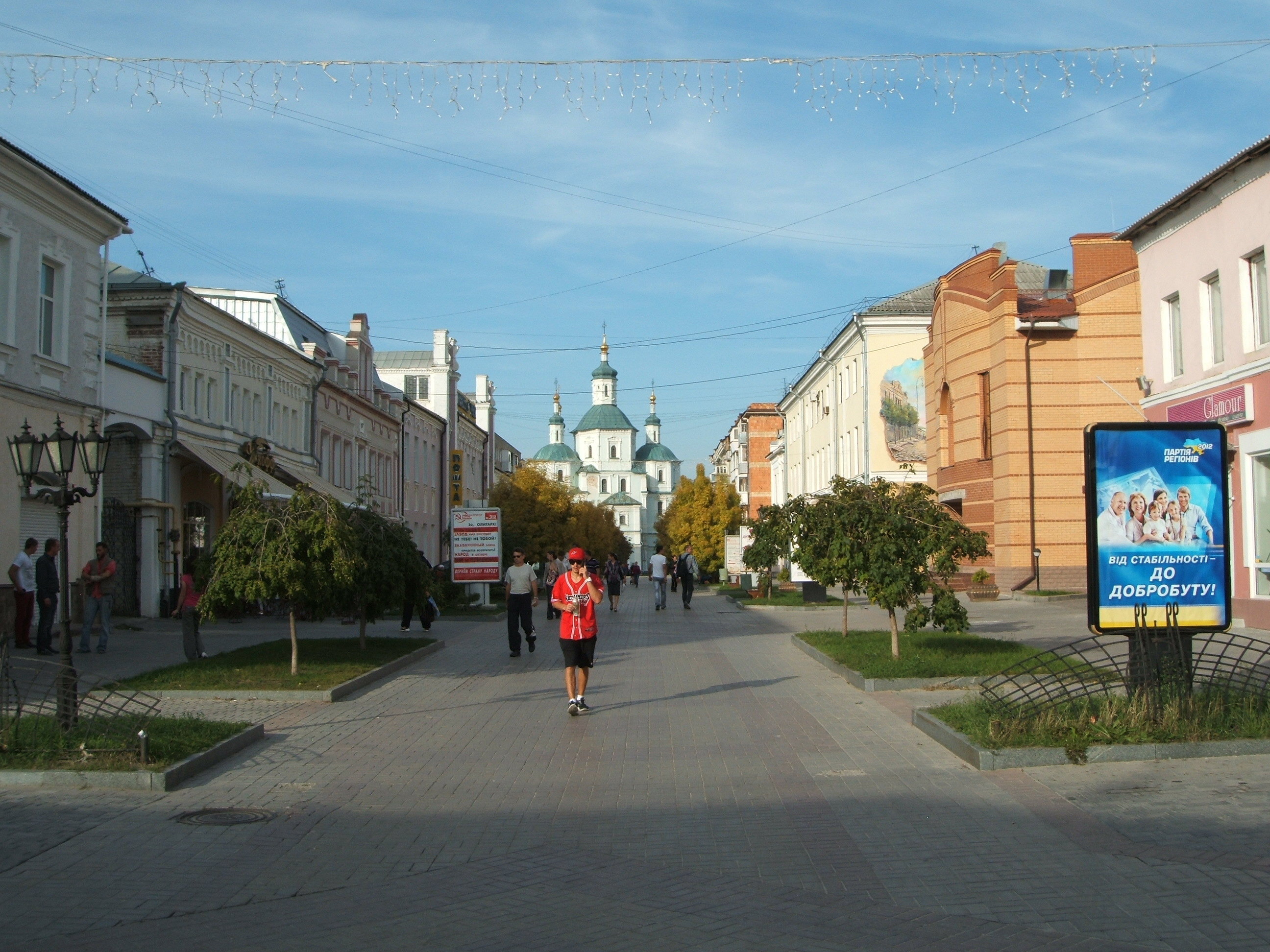 Воскресенська вулиця у напрямі від перехрестя з провулком Терезова до Воскресенської церкви